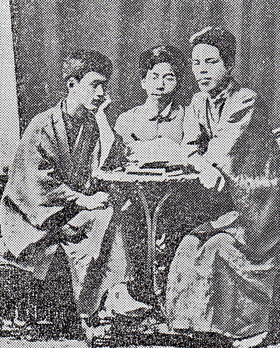 札幌農学校の同級生による札幌三人組、内村鑑三、宮部金吾、新渡戸稲造